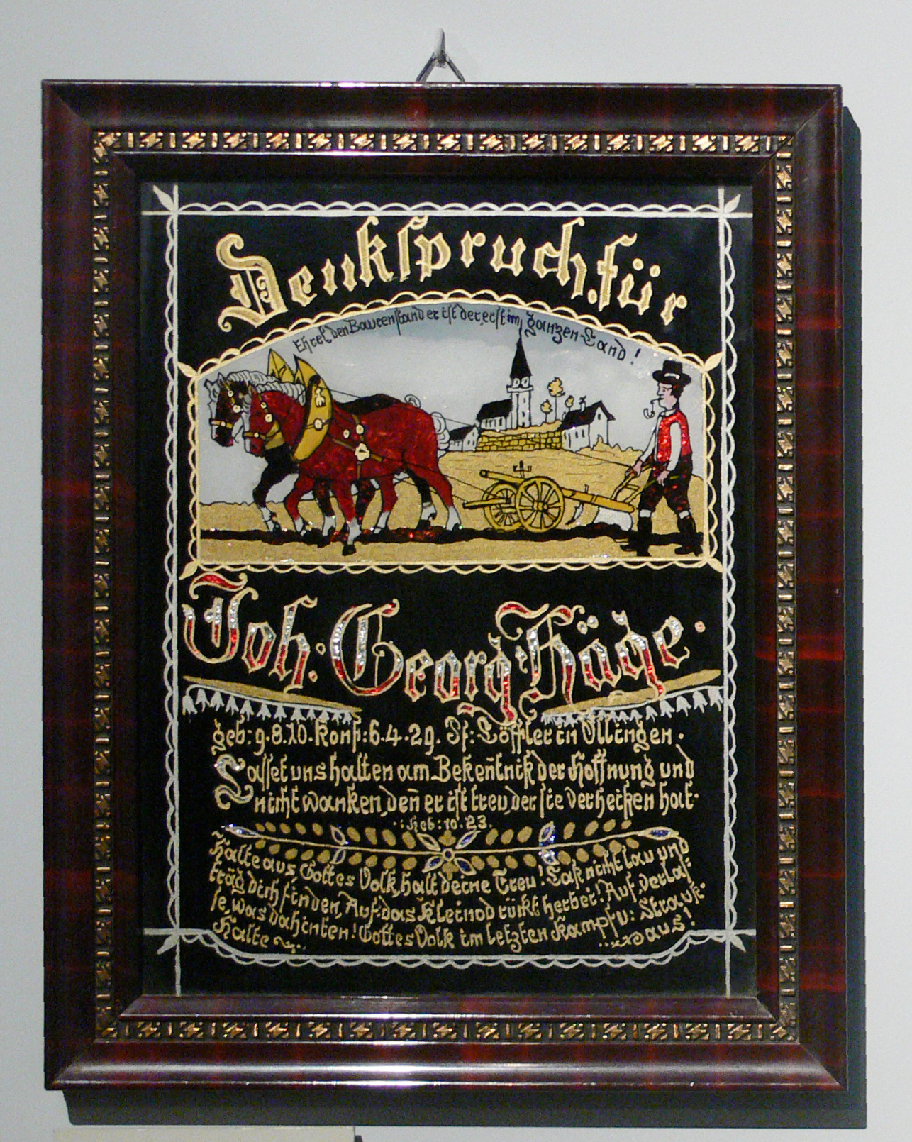 Spruchbild zur Konfirmation (Hinterglasmalerei, zum Teil in Eglomisétechnik, Papier, Silberfolie, Nadelholzrahmen), aus Öllingen bei Langenau, 1929 Landesmuseum Württemberg (Außenstelle Museum für Volkskultur in Württemberg, Waldenbuch) 1.2.2, Inv. Nr. VK 1974/19